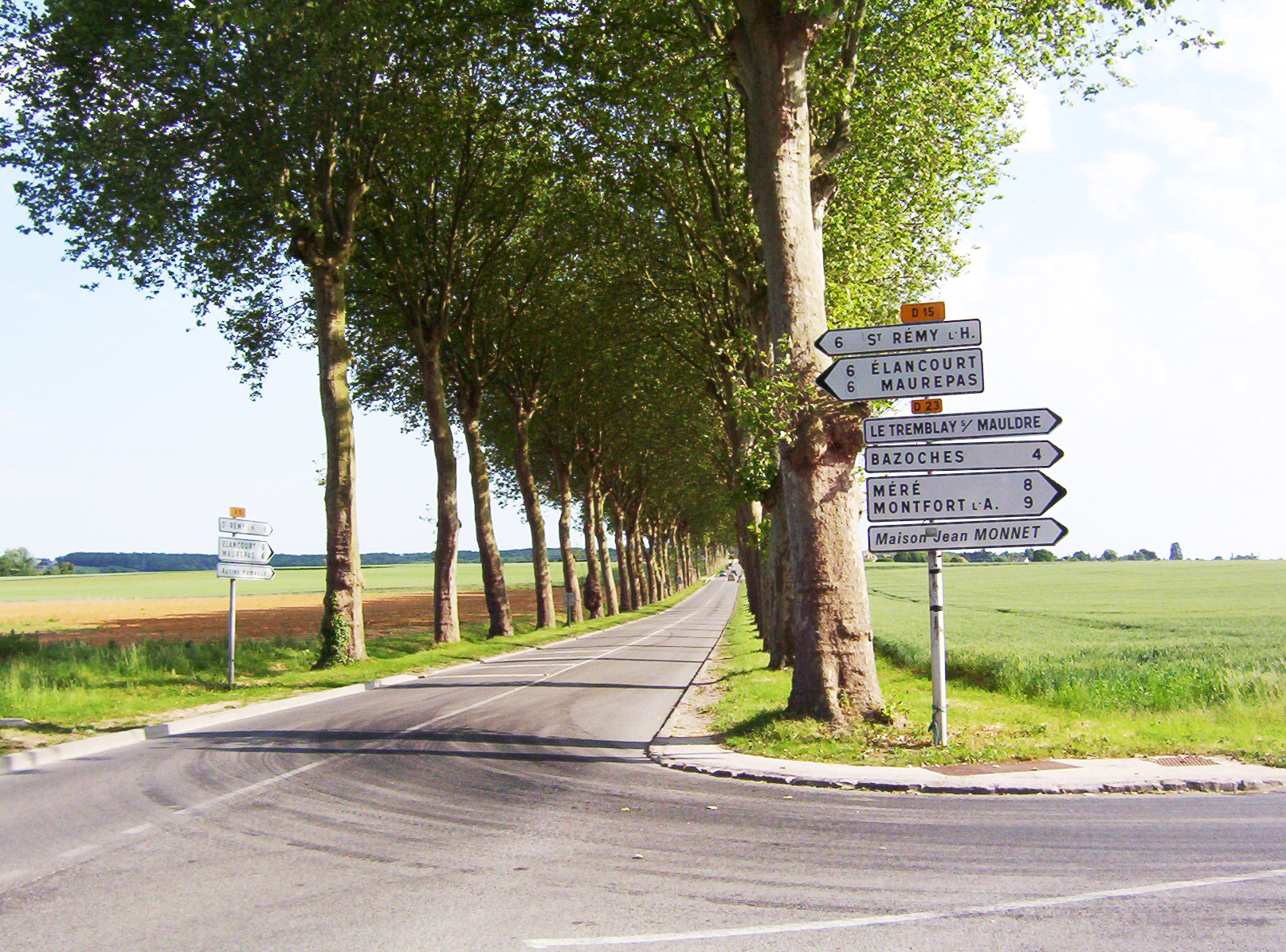 Route D15, Yvelines (78) France